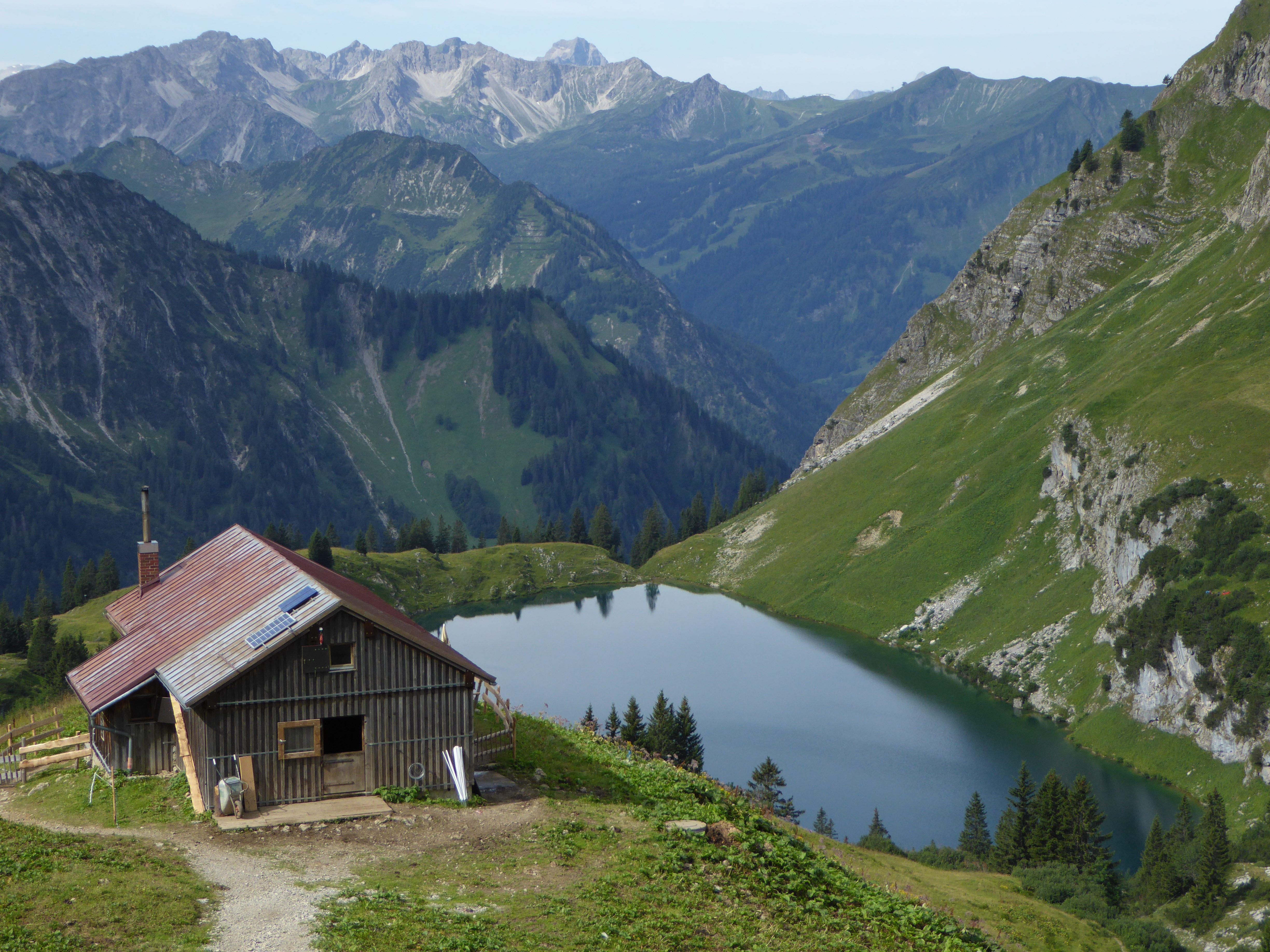 Seealpsee (Allgäu)